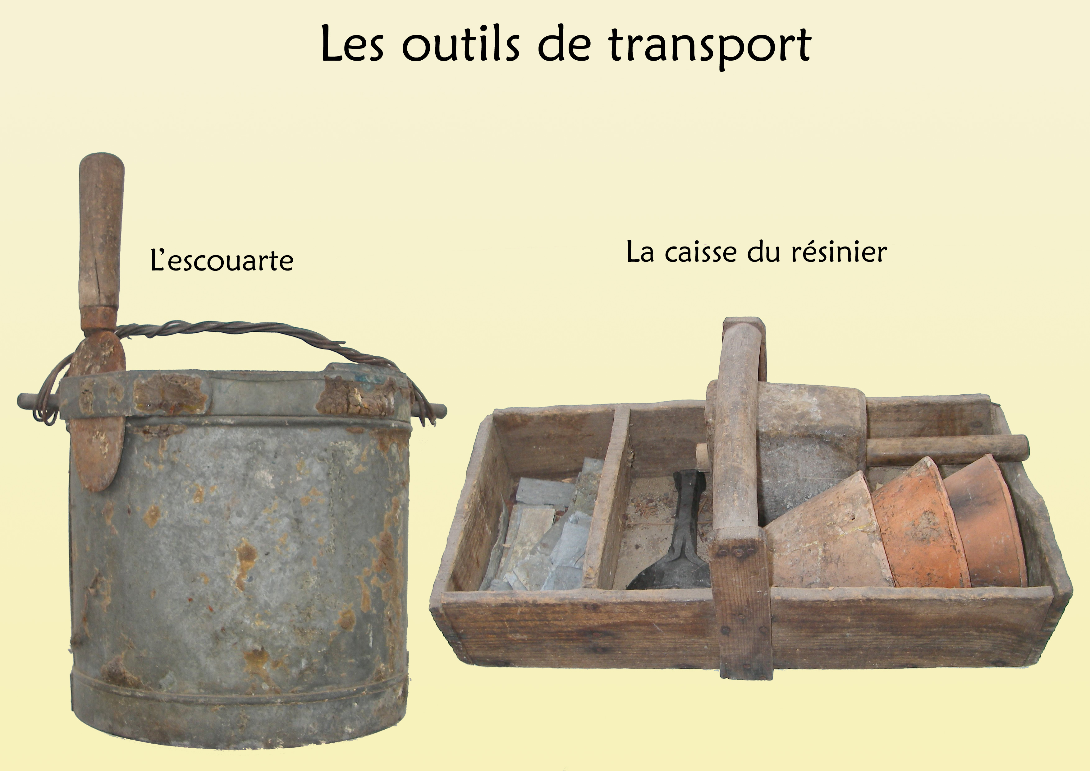 Les outils du gemmeur